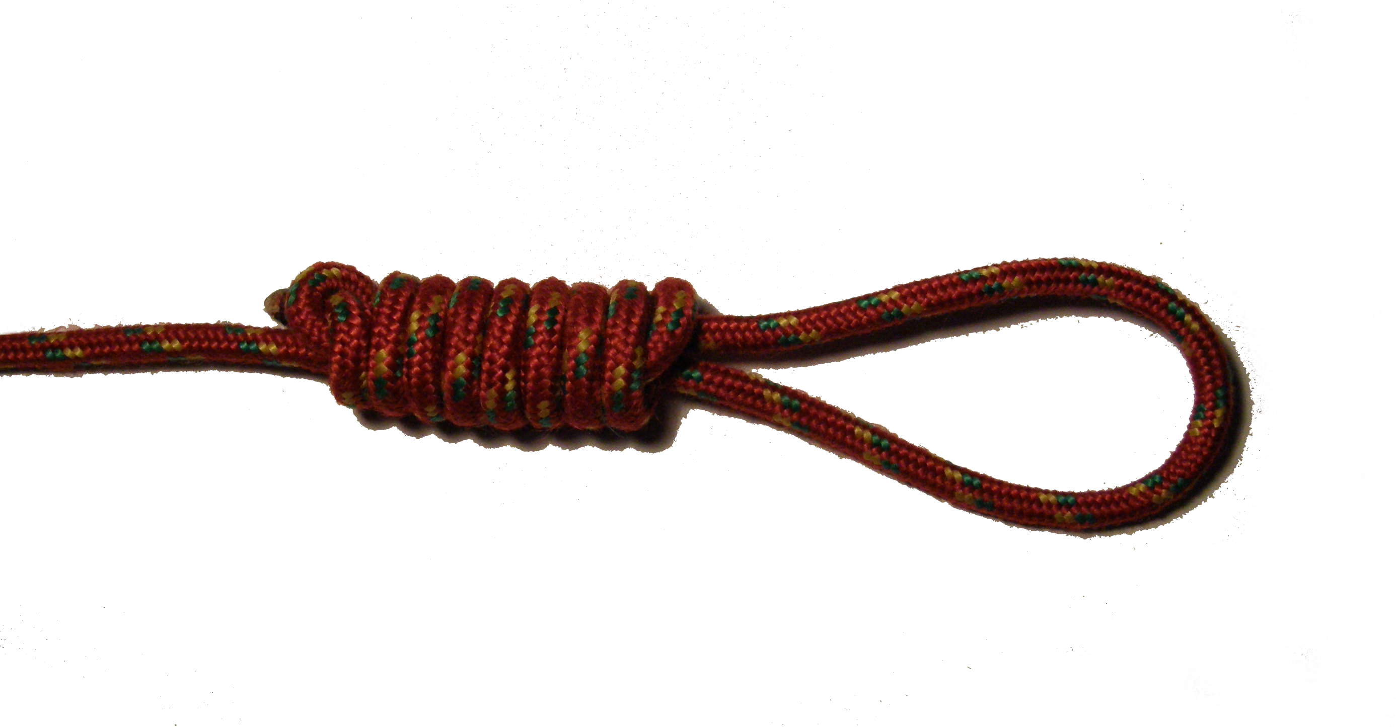 Henkersknoten